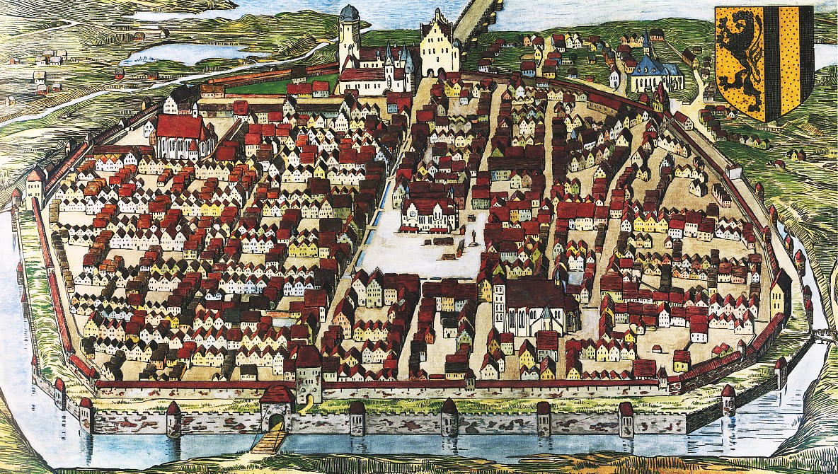 Zeichnung nach einem 1521 entstandenen Dresdner Stadtmodell aus Holz, das die Stadt vor der Remparierung ab 1519 zeigt. Das Modell wurde von dem Holländer Max Stam geschaffen.